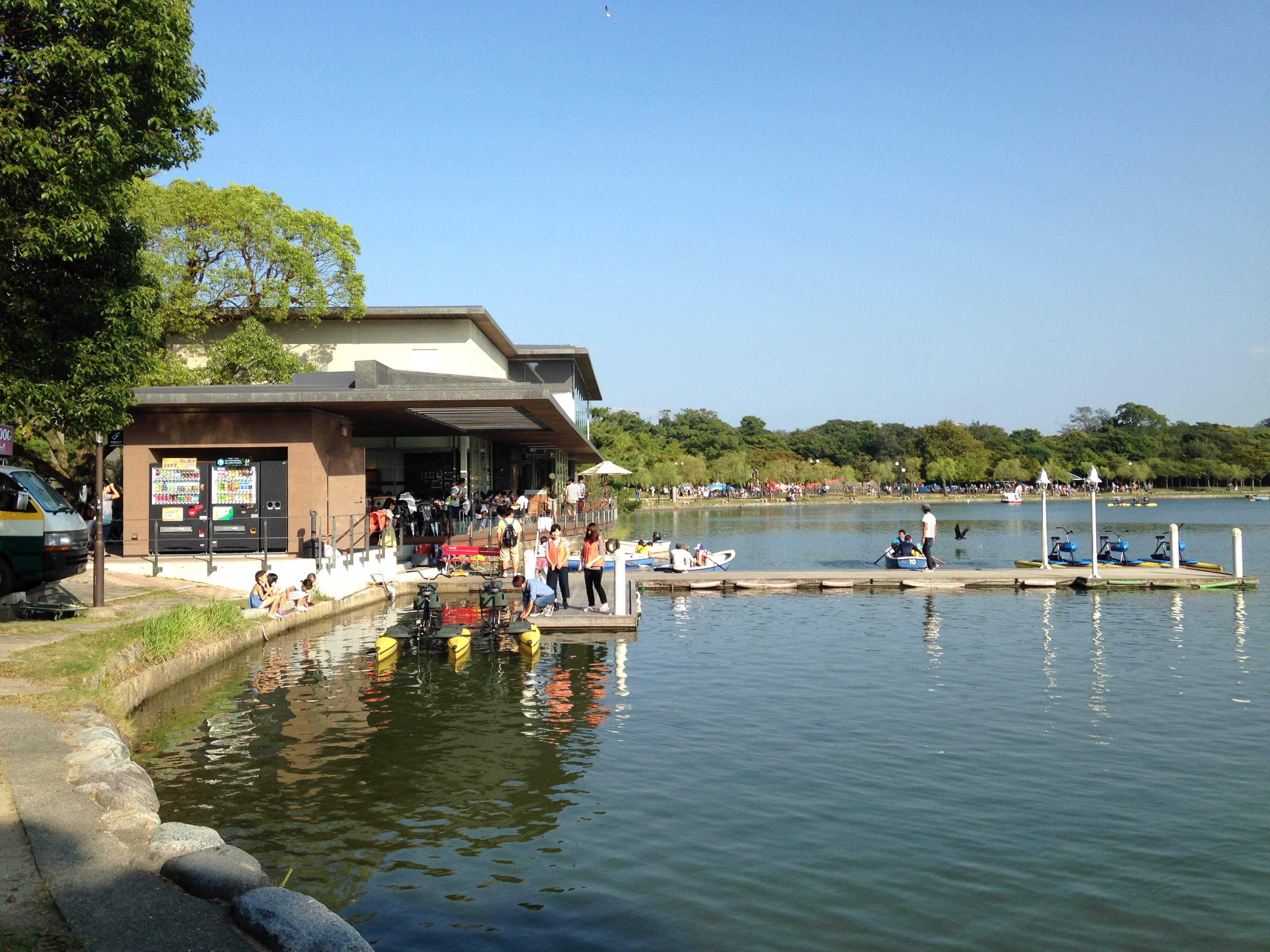 大濠公園のボートハウスと船着き場